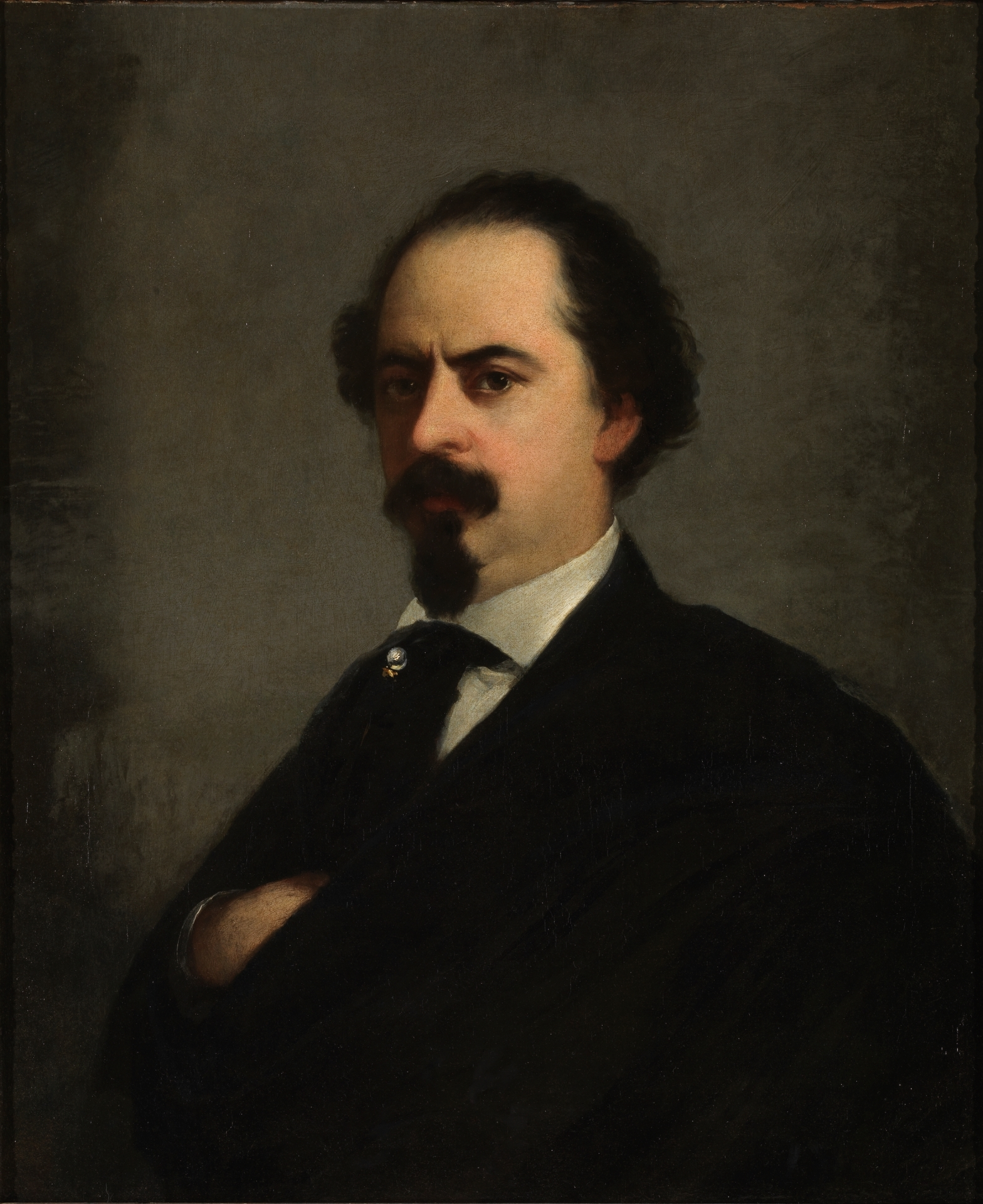 Autorretrato del pintor español Eugenio Lucas Velázquez (1817-1870).